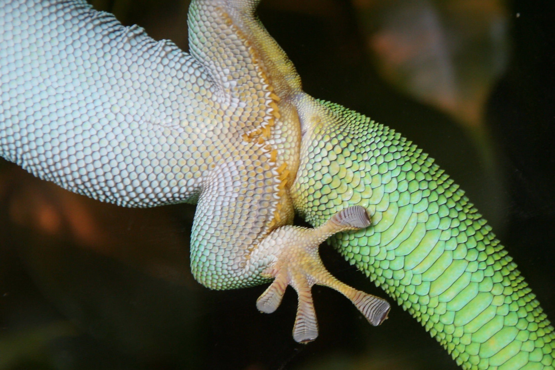 Gecko feet